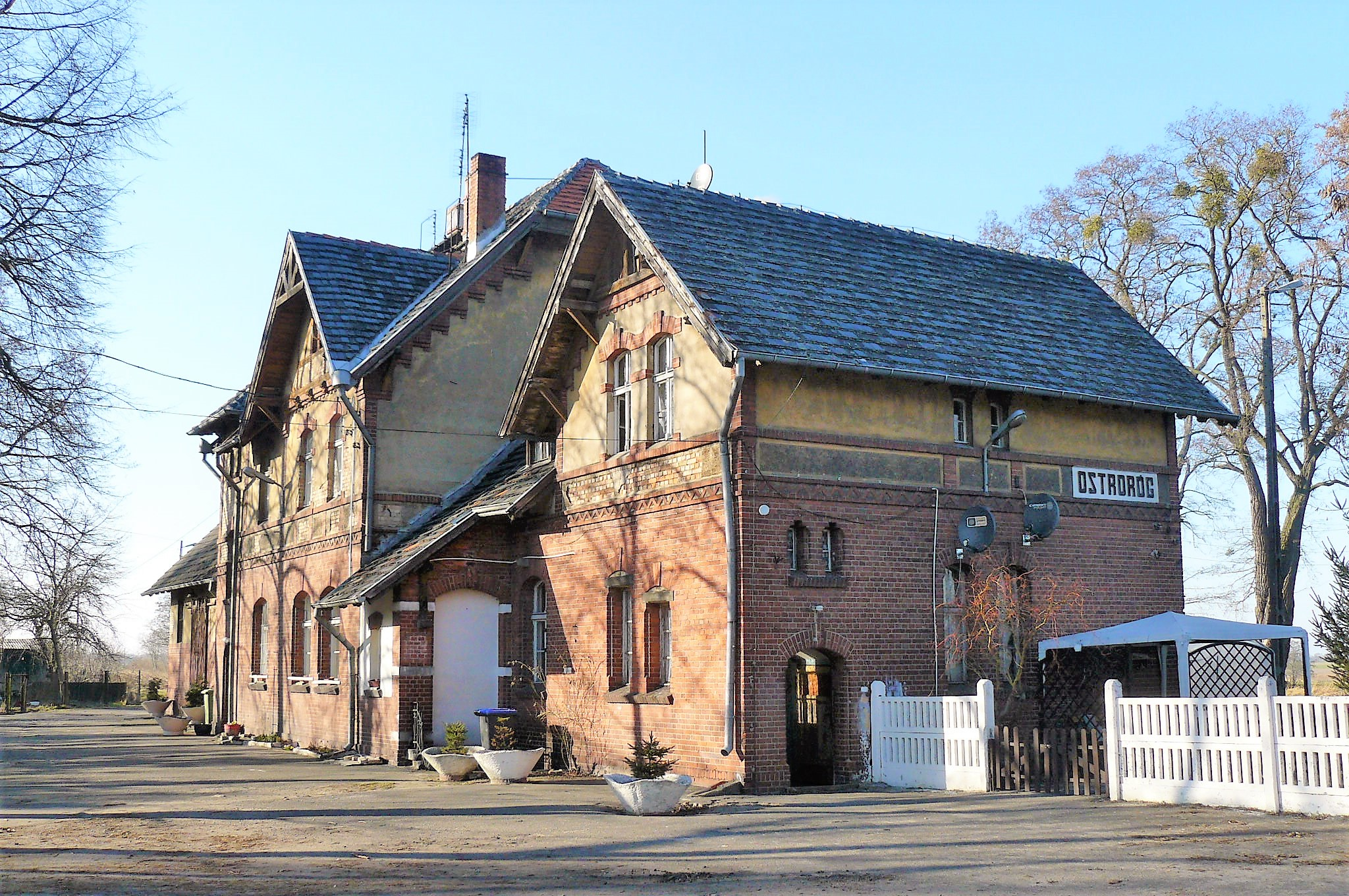 Dworzec kolejowy w Ostrorogu.